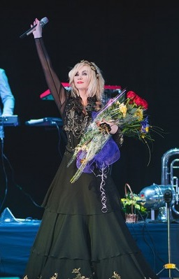 Ирина Билык на гастролях в 2013 году